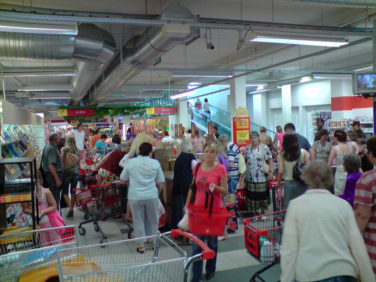 Keskpäev Selveris. Tundub, et inimestel aega ja raha ikka jagub.